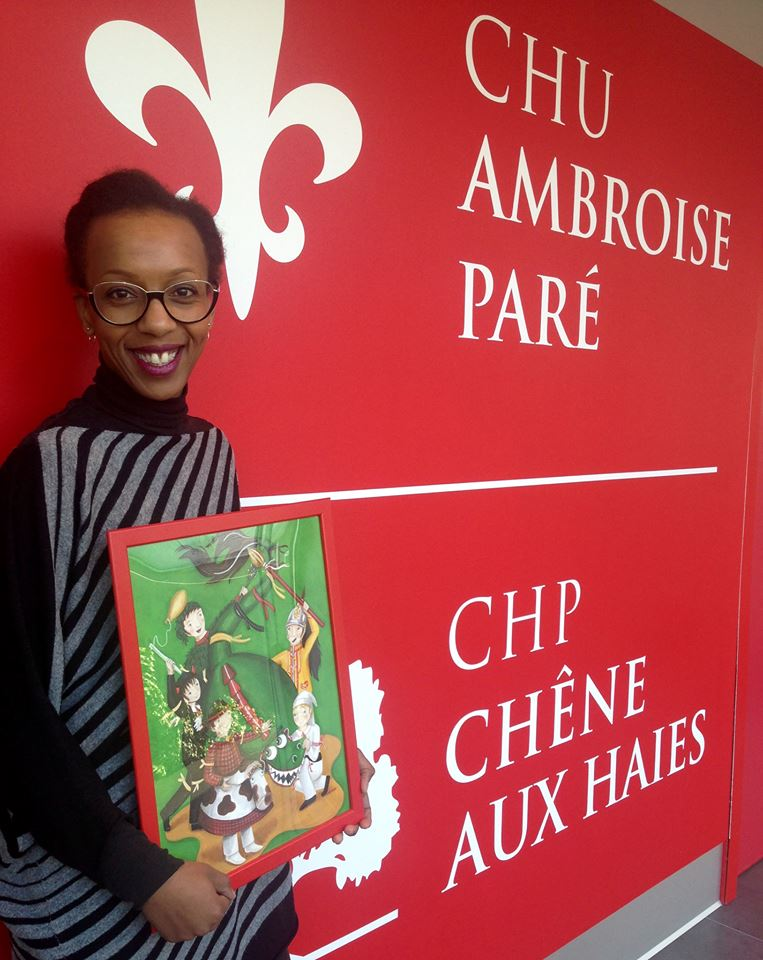 Joëlle Kapompole au CHUP Ambroise Paré